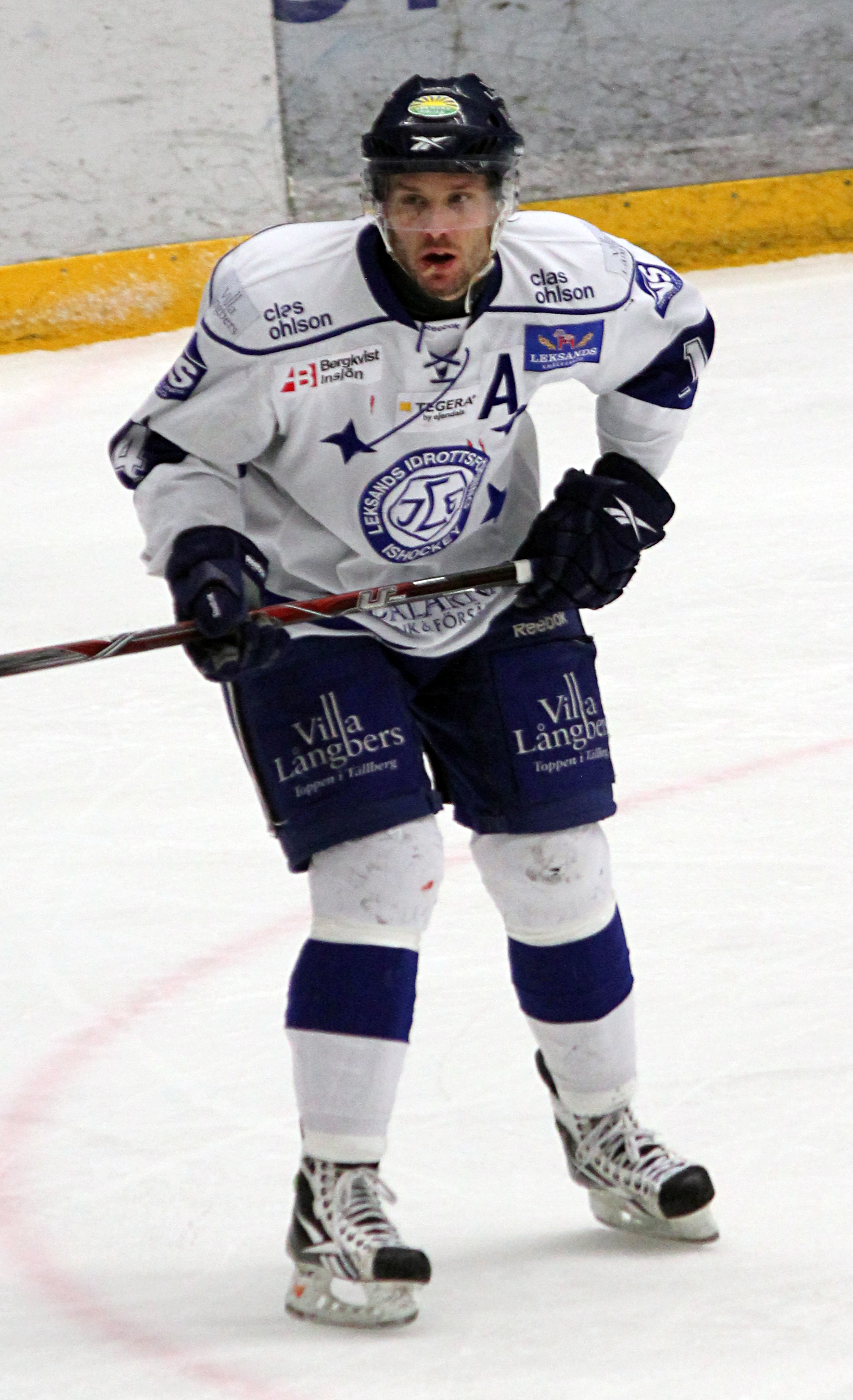 Jesper Ollas för Leksands IF mot VIK Västerås HK 29 januari 2011.